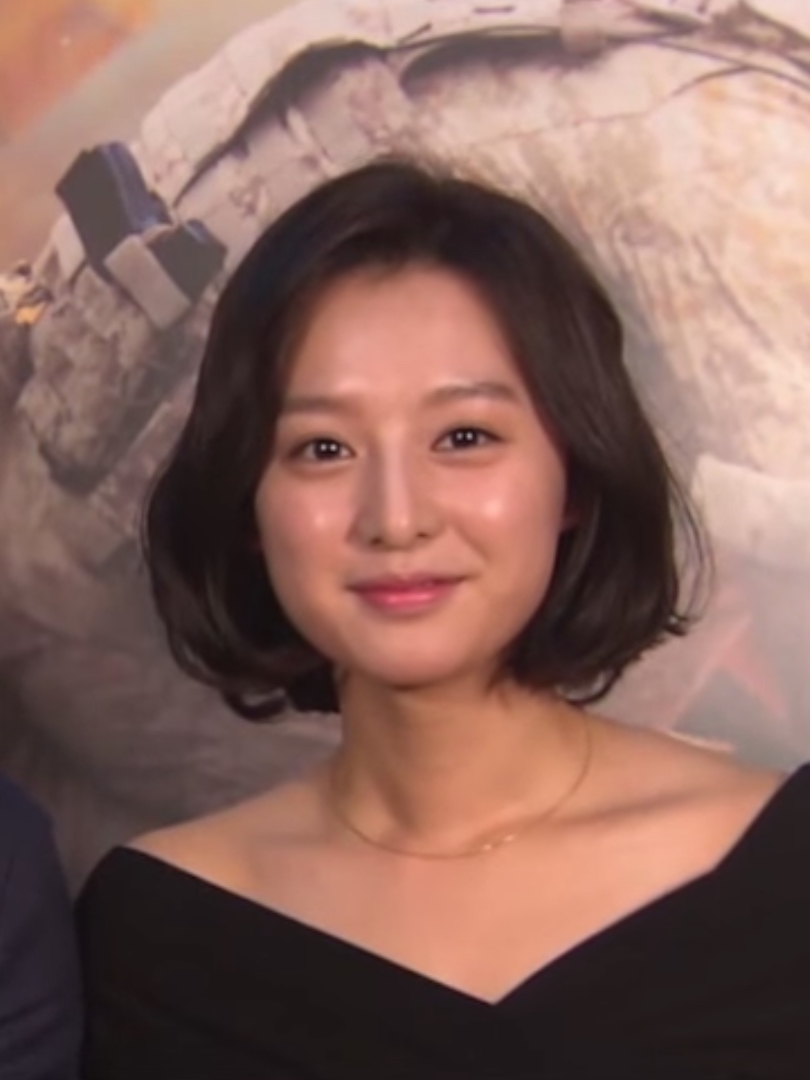 "태양의후예" 드라맥스 ID영상 - 김지원